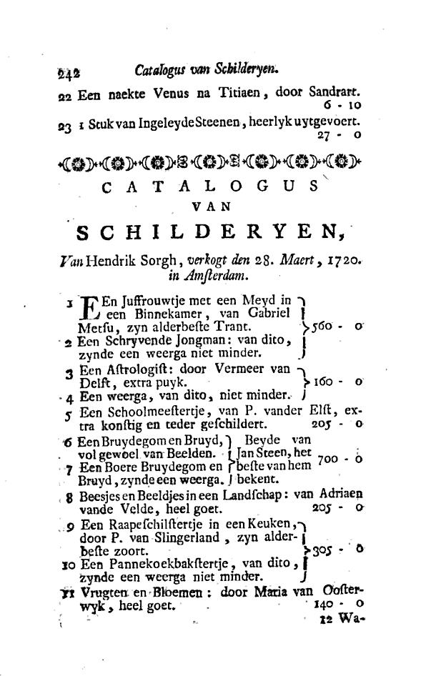 Catalogus of naamlyst van schilderyen, met derzelven pryzen. Uitgegeven door Gerard Hoet, 's Gravenhage: Pieter Gerard van Baalen, 1752, p. 242.